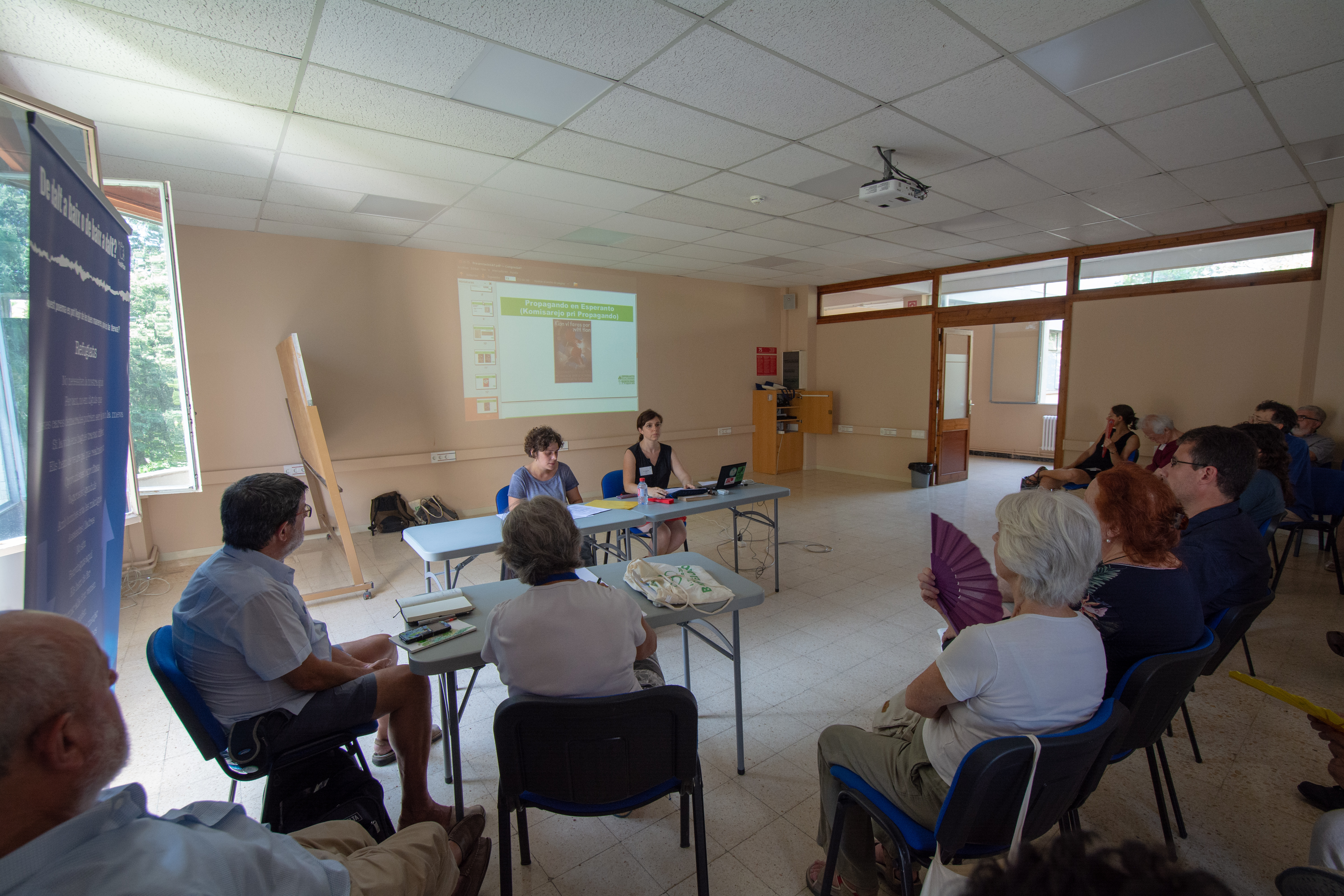 Prelego de Ester Boquera pri la Komisarejo pri propagando.